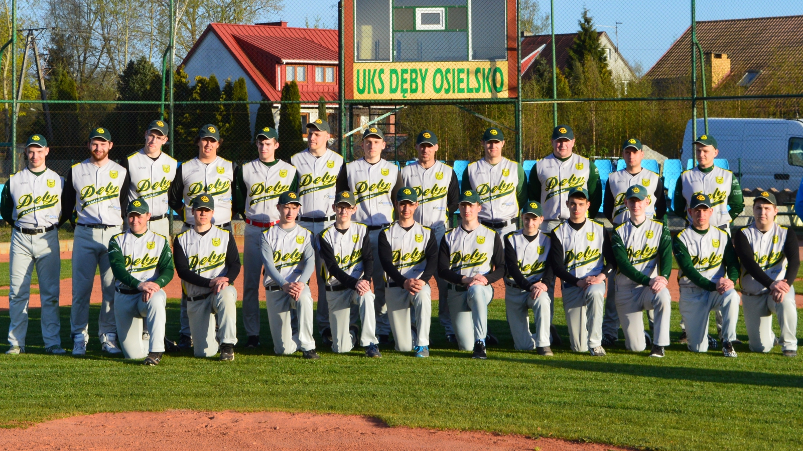 Zespół Dęby Osielsko - sezon 2015